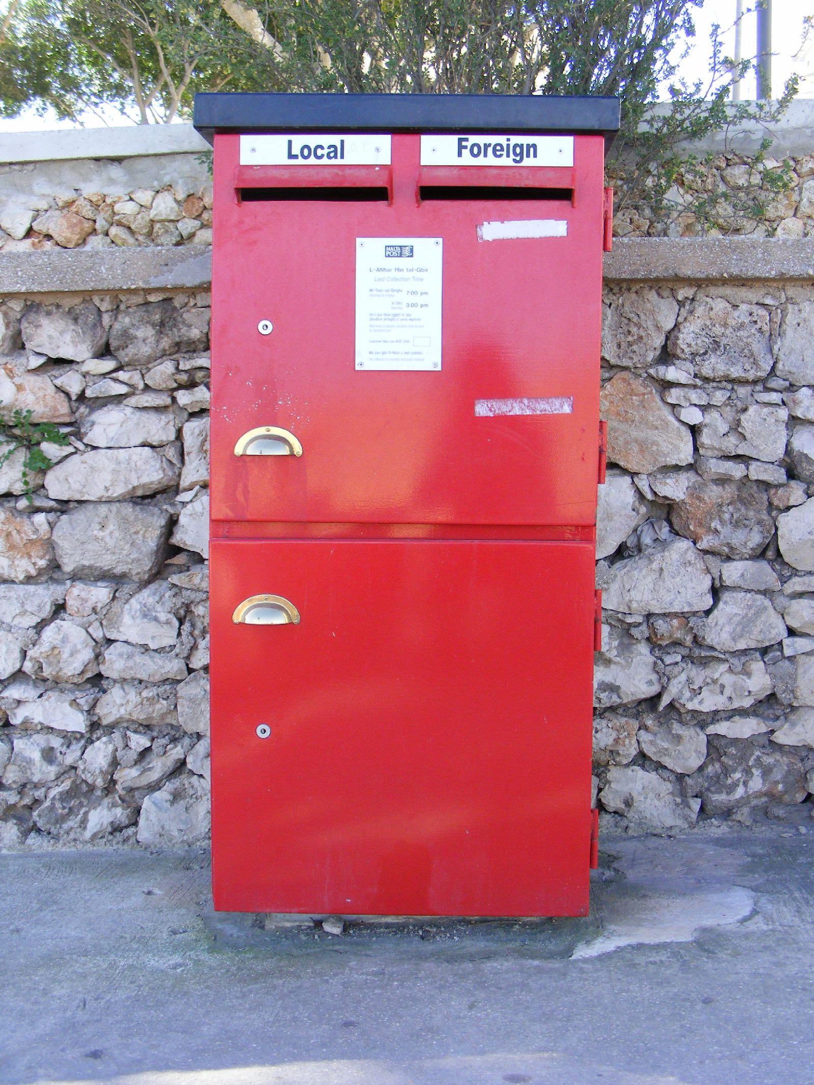 Malta Post Box, Mellieha. March 2010